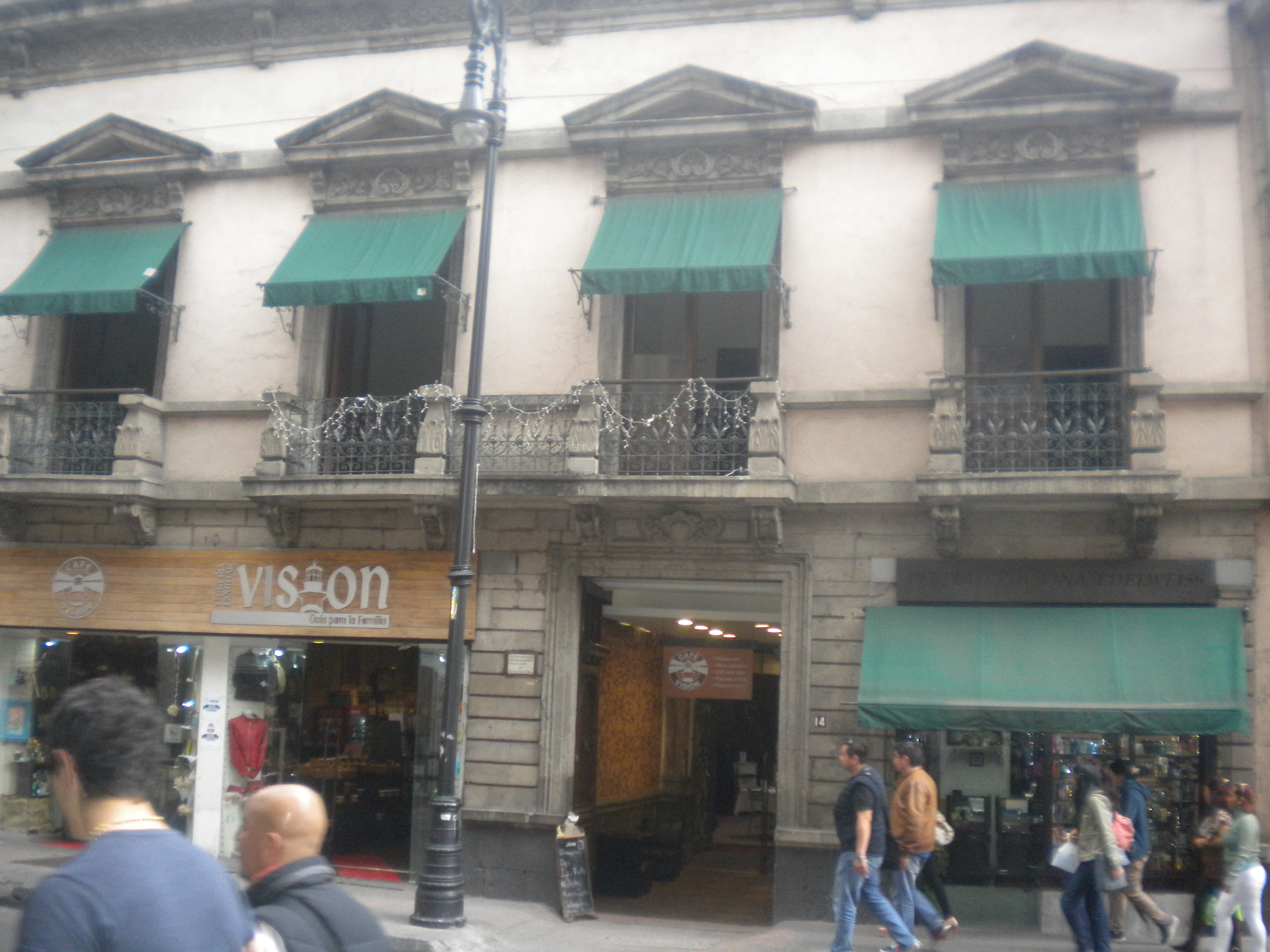 Casa en donde el general presidente pasó sus últimos días y en donde escribe la mayor parte de sus memorias